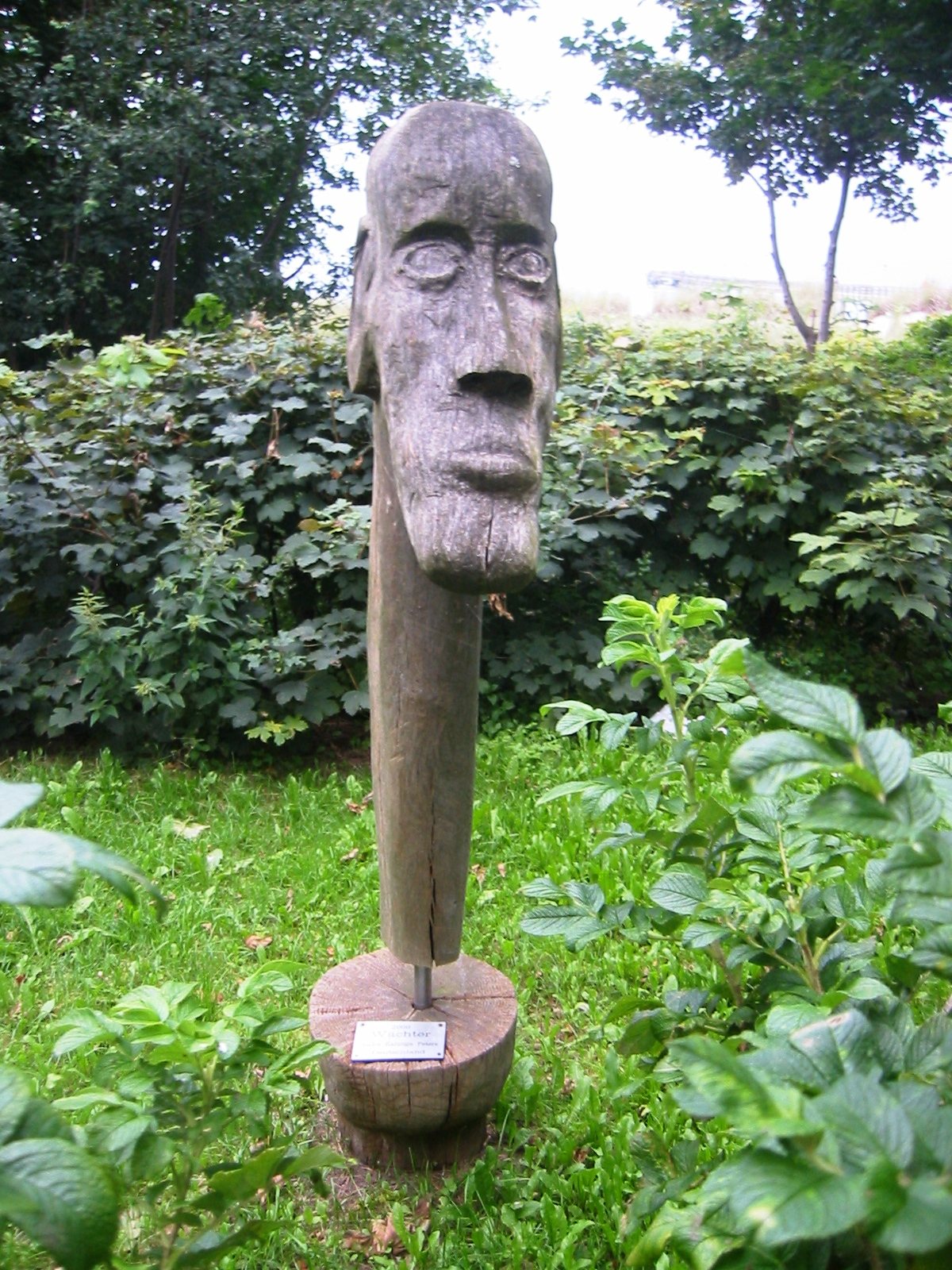 Skulptur "Wächter" von Andre Kalunga Peters aus dem Jahr 2000. Die Skulptur entstand während eines deutsch-polnischen Holzbildhauerseminars und befindet sich an der Strandpromenade in Lubmin, einer Gemeinde im Landkreis Ostvorpommern